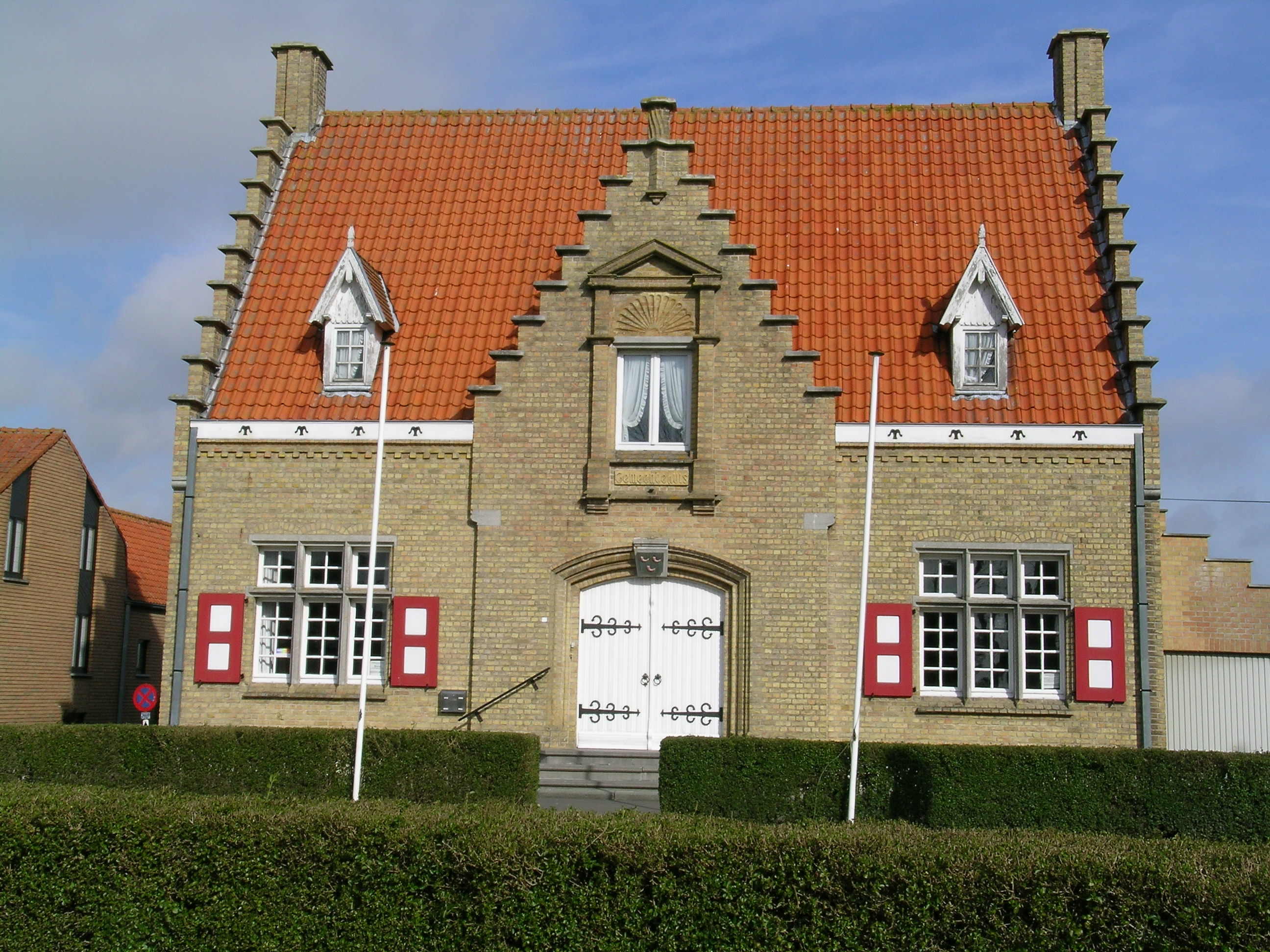 Voormalig gemeentehuis